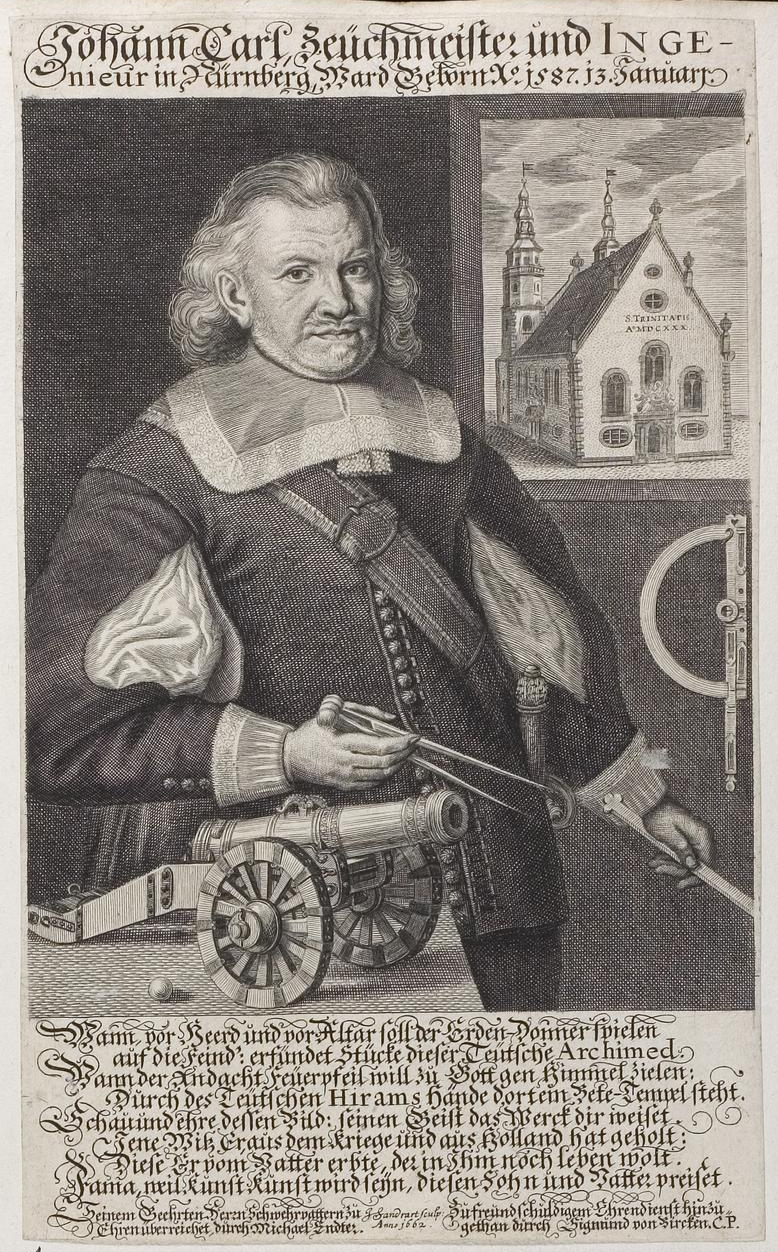 Grafik aus dem Klebeband Nr. 3 der Fürstlich Waldeckschen Hofbibliothek Arolsen Motiv: Johann (Hanns) Carl mit Kanone(nmodell), im Hintergrund die von ihm erbaute Dreieinigkeitskirche in Regensburg mit Gedicht von Sigmund von Birken